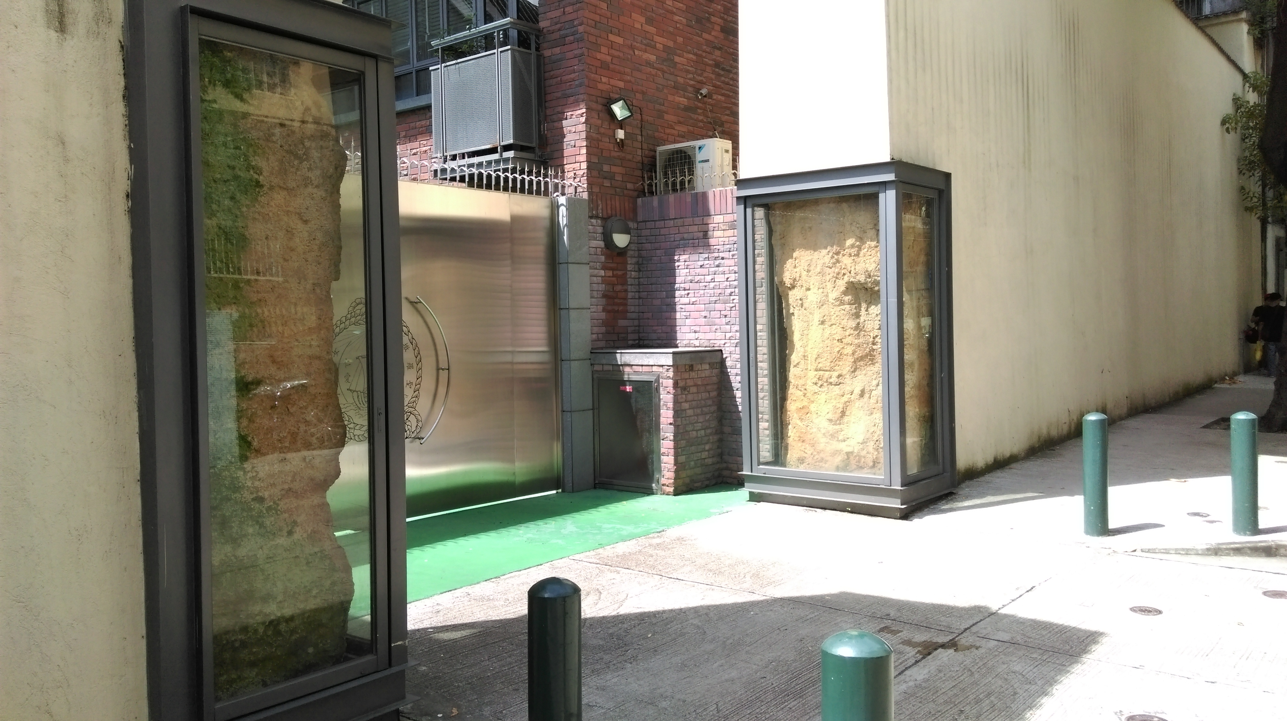 中文（台灣）: 澳門舊城牆遺址（聖羅撒女子中學後門）